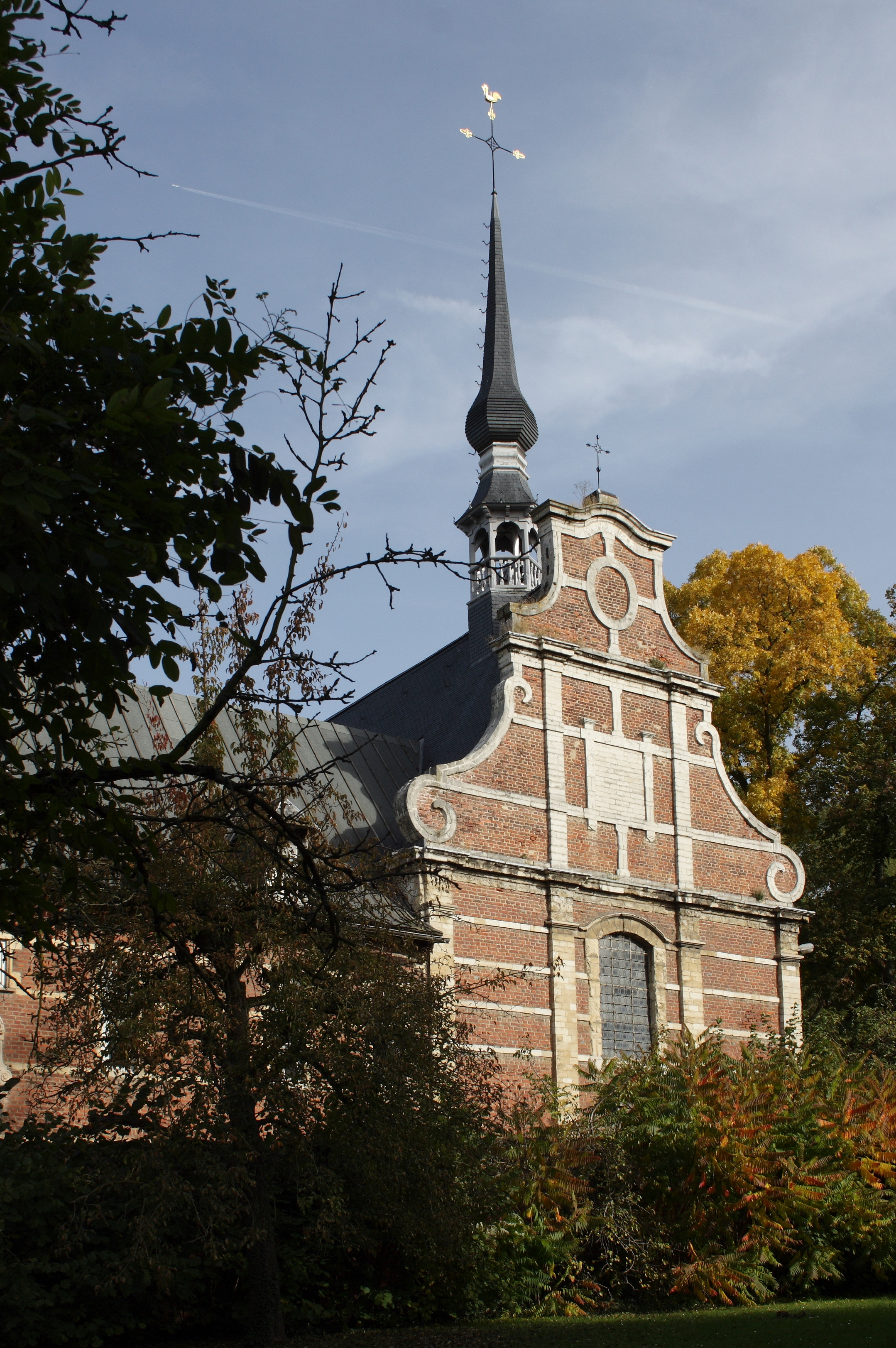 Ehemalige Kapelle der Zwartzusters in Löwen in der Provinz Flämisch-Brabant (Belgien), Löwen in der Provinz Flämisch-Brabant (Belgien), 1687-1693 errichtet